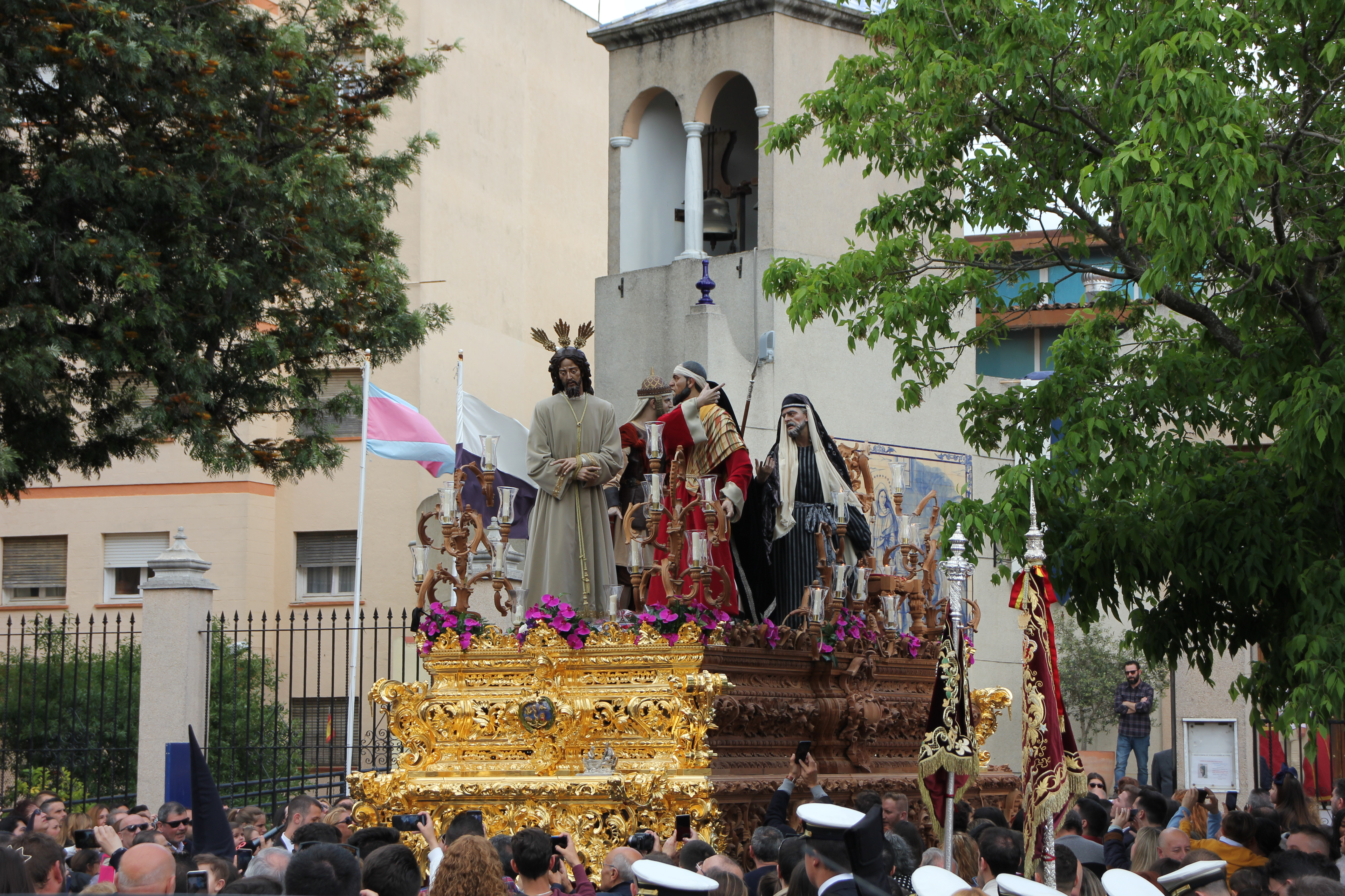 Hermandad de la Redención (Jerez de la Frontera)